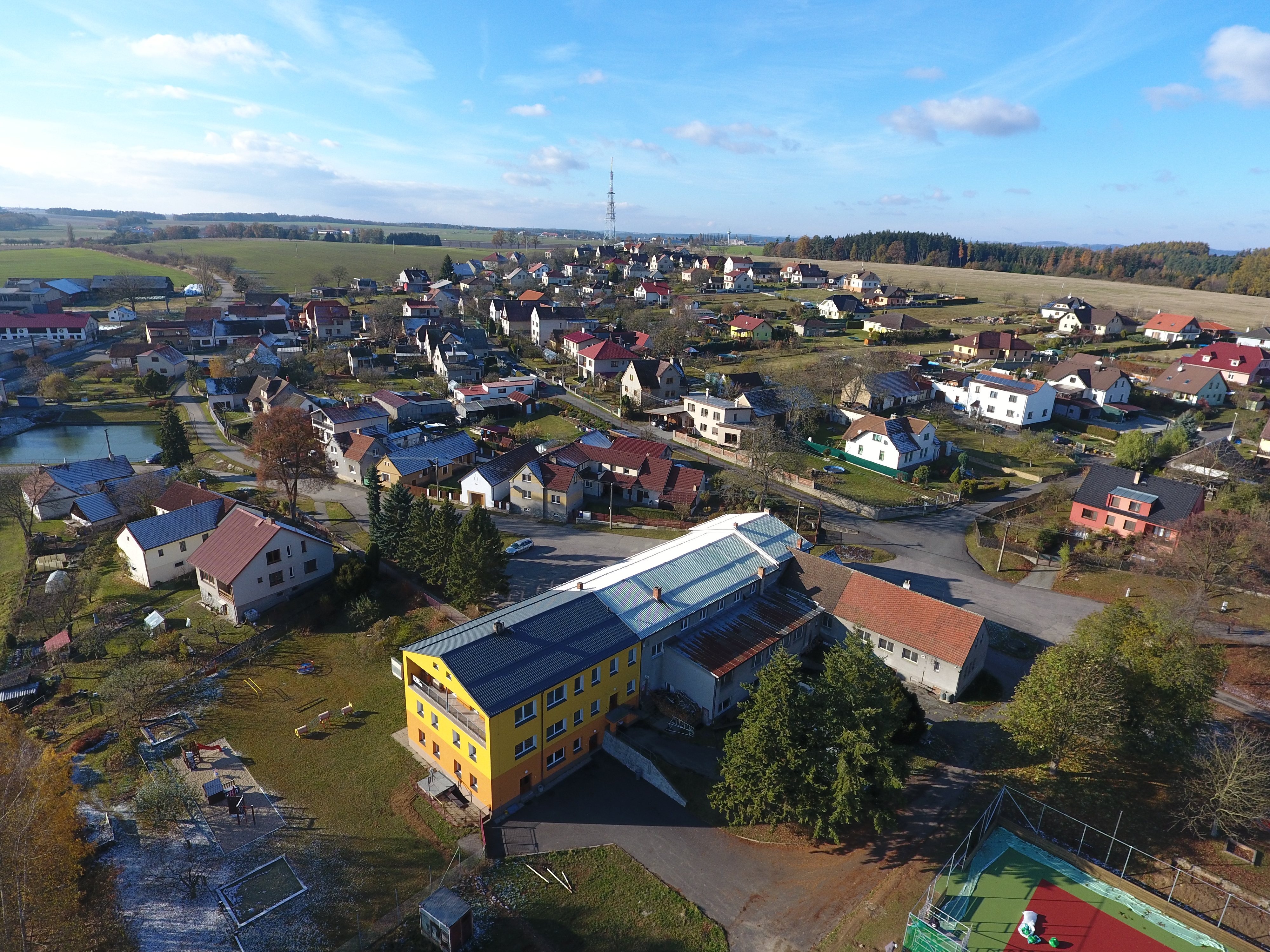 Radimovice u Želče, pohled od JV